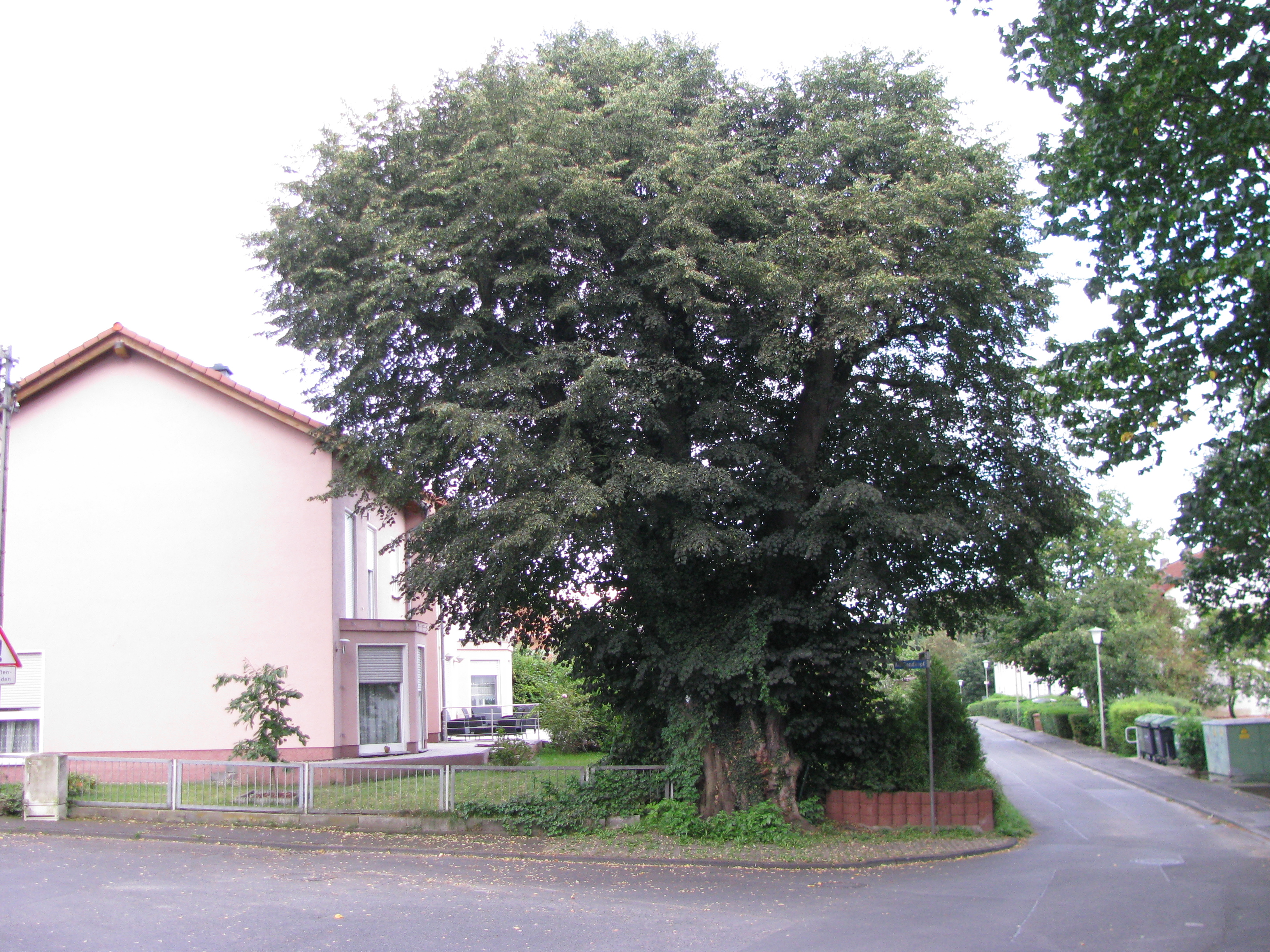 Winterlinde an der Einmündung der Straße Am Sandkopf in die Straße Alt Philippinenhof